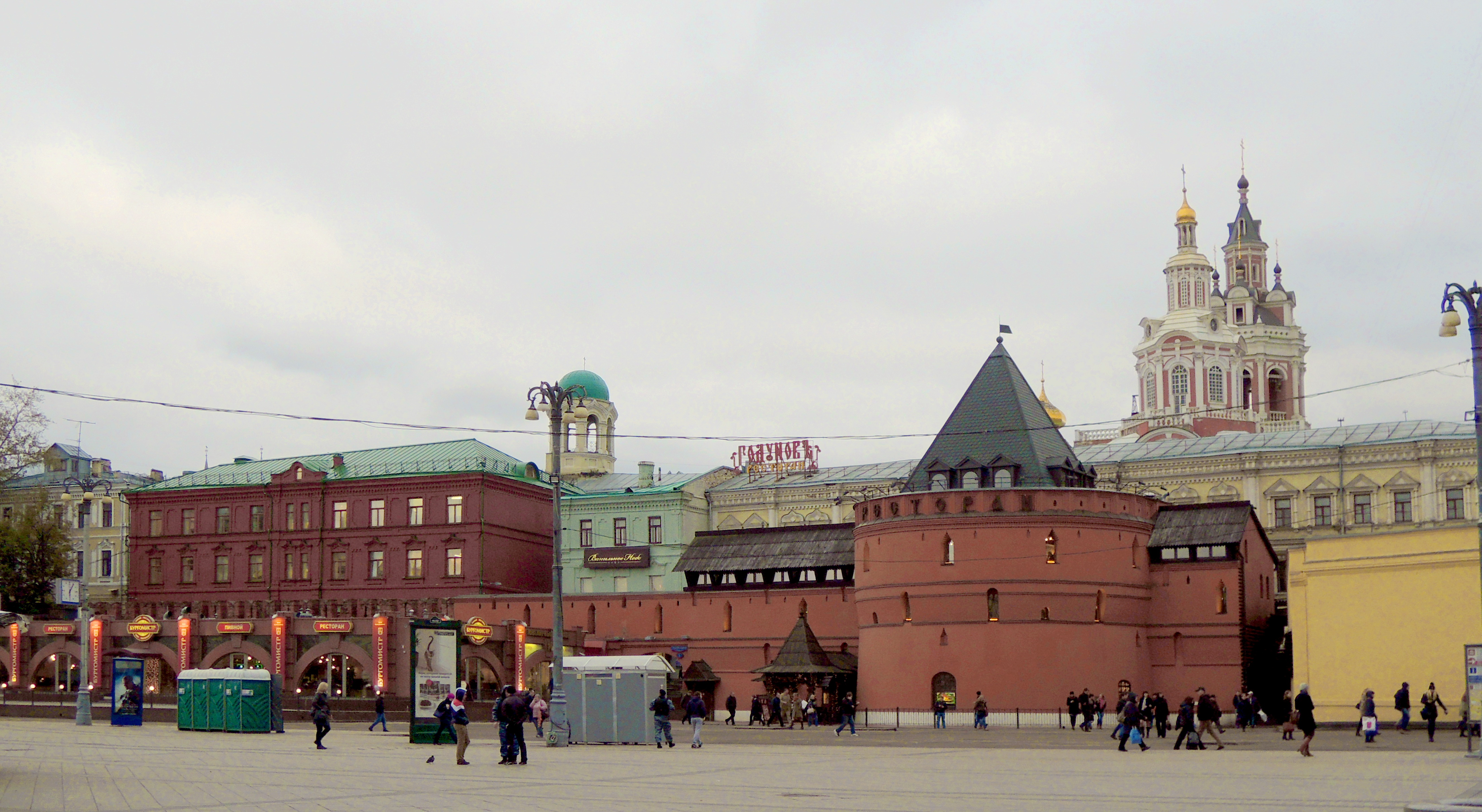 Площадь Революции. Ресторан "Старая Башня"